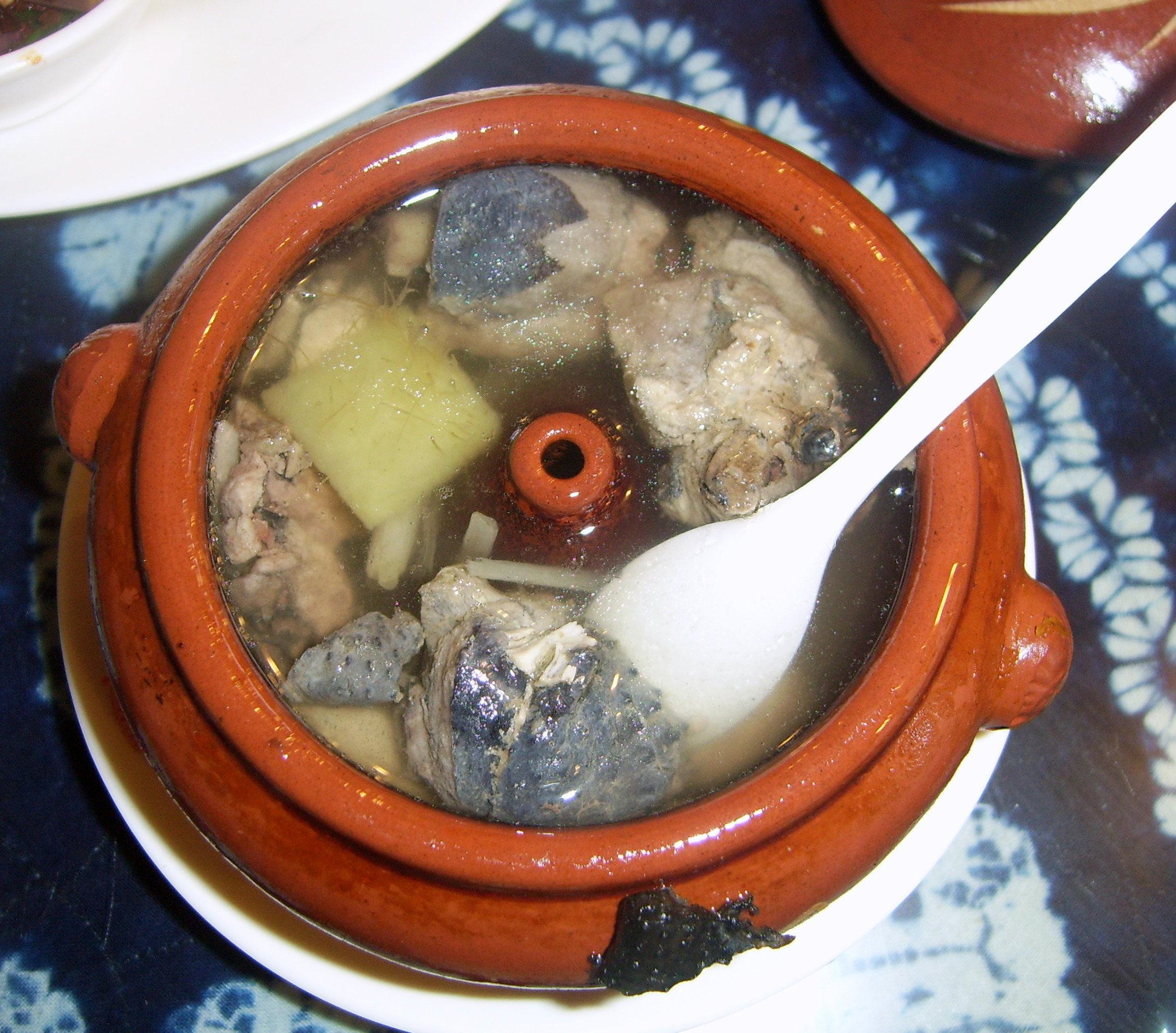 汽锅鸡，图中所用鸡肉是乌鸡